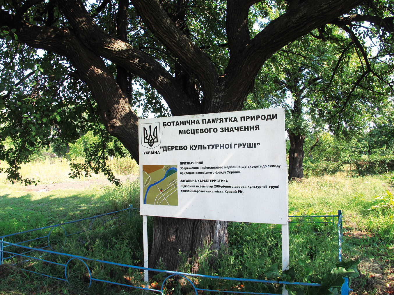 Ботанічна пам'ятка природи "Дерево культурної груші"